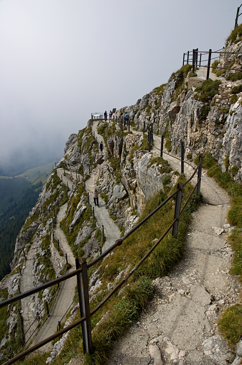 Wendelstein - auf geht's zum Gipfel - die letzten Schritte - alles wieder im Lot Der Wendelstein ist ein 1838 Meter hoher Berg der Bayerischen Alpen. Er gehört zum so genannten Mangfallgebirge, dem östlichen Teil der Bayerischen Voralpen. Er ist höchster Gipfel des Wendelsteinmassivs. Wegen seiner exponierten Lage bietet er eine sehr gute Aussicht ins Bayerische Alpenvorland und ist umgekehrt im weiten Umkreis zu erkennen. Er liegt zwischen den Tälern von Leitzach und Inn und ist mit der Wendelstein-Seilbahn und der Wendelstein-Zahnradbahn erschlossen. An seinen nördlichen Ausläufern entspringt der Jenbach, der auf seinem Weg zur Mangfall zur Kalten wird. Talorte sind unter anderem Bayrischzell, Brannenburg (Zahnradbahn) und Osterhofen (Seilbahn). - Wikipedia